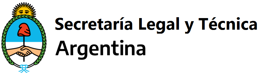 Secretaría Legal y Técnica